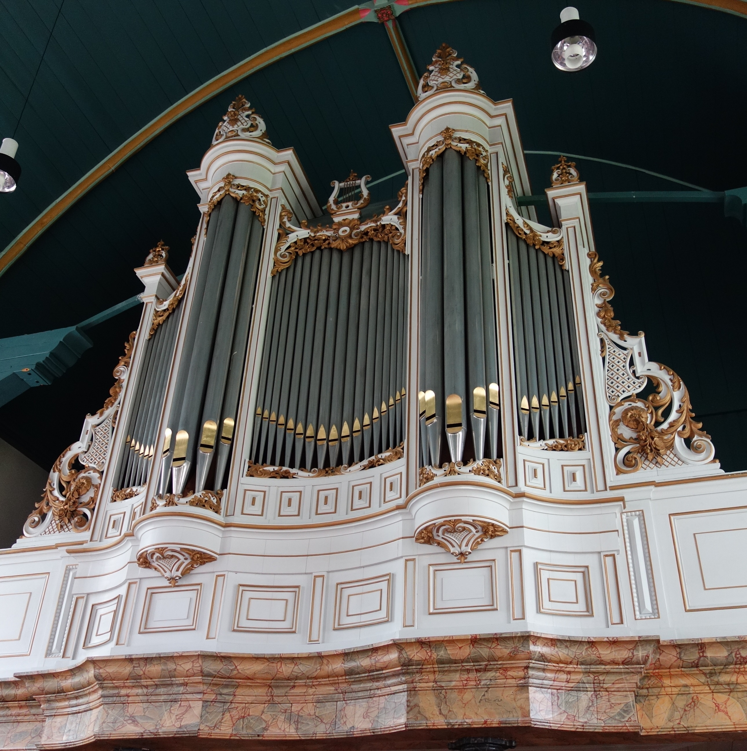 Orgel van de Sint-Maartens- of Dorpskerk in Zwaag. Het is in 1881 gemaakt door L. van Dam & Zonen.